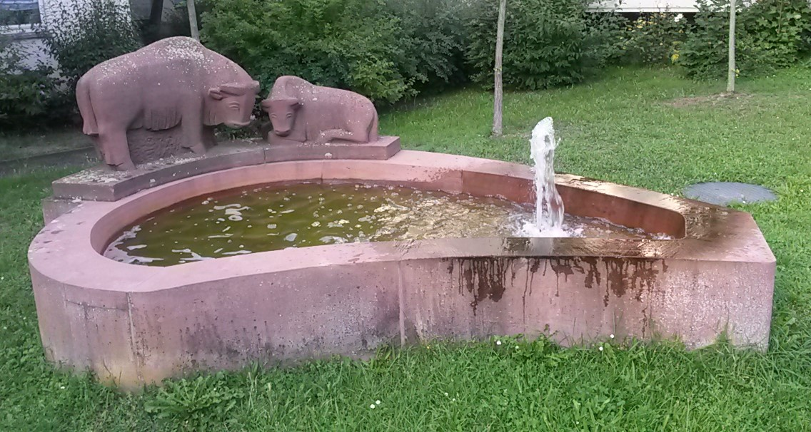 Brunnenanlage Stiere, rosa Sandstein, um 1955, Fritz Schwarzbeck, Darmstadt